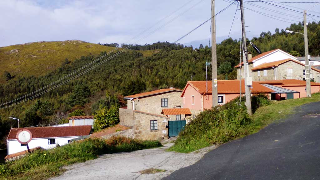 Vista de San Cristovo, Brión.